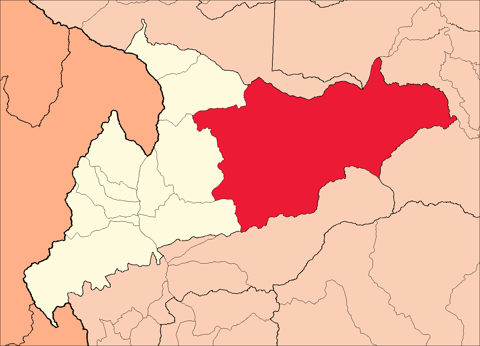 Área del distrito de Monzón dentro de la provincia de Huamalíes.